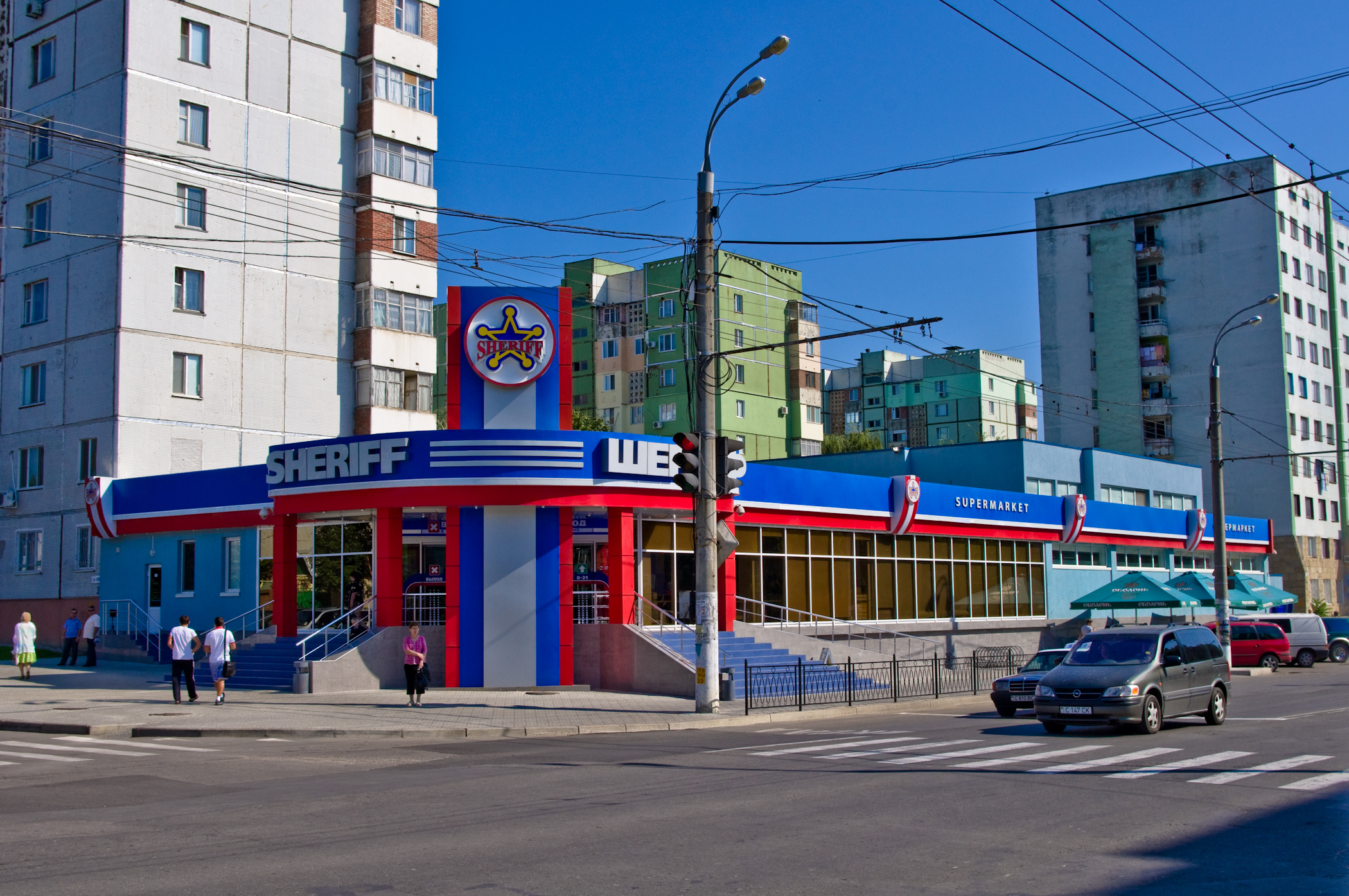 Магазин "Шериф". Находится в Тирасполе на перекрёстке улиц: Карла Либкнехта и Котовского.